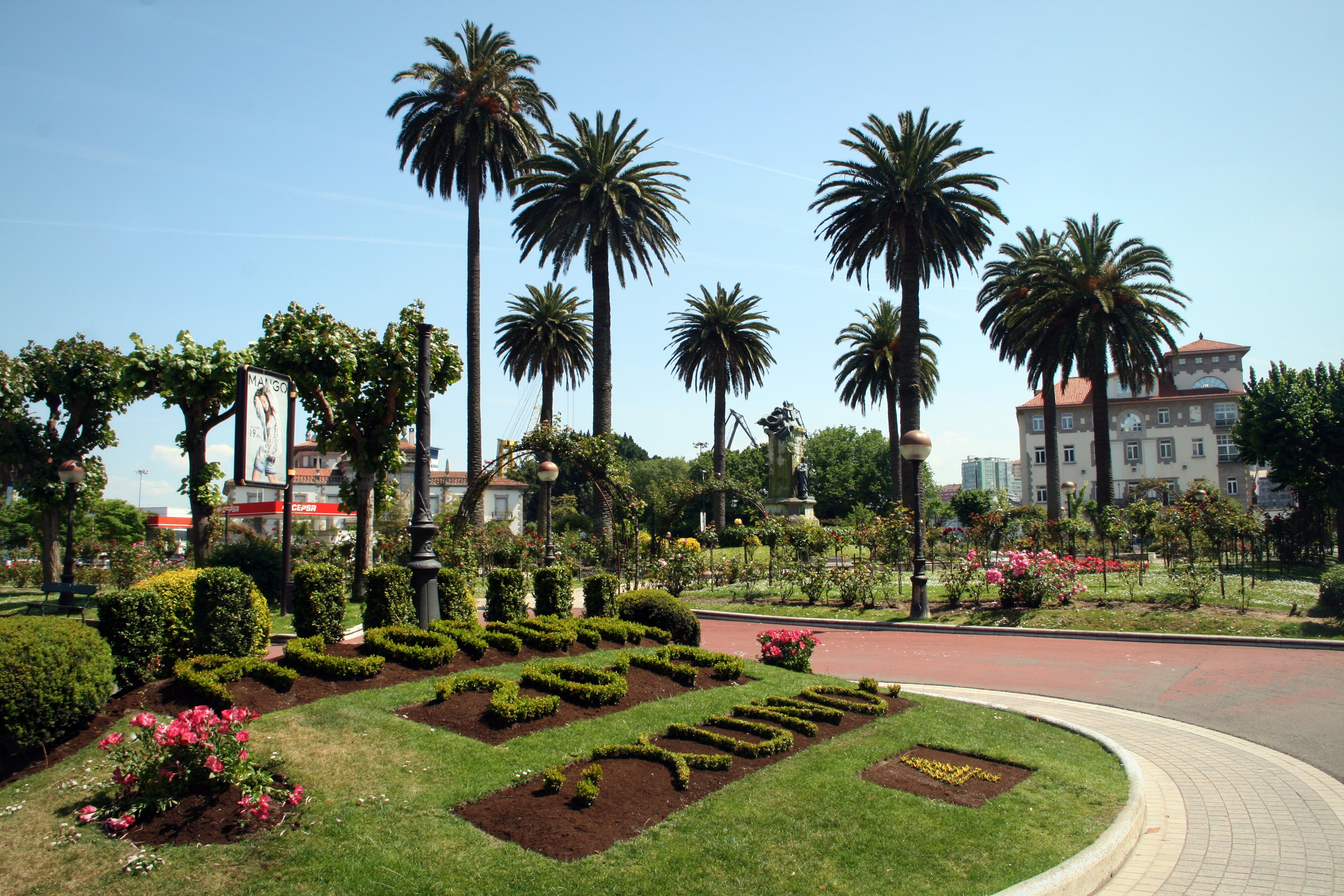 Xardíns de Méndez Núñez (A Coruña).